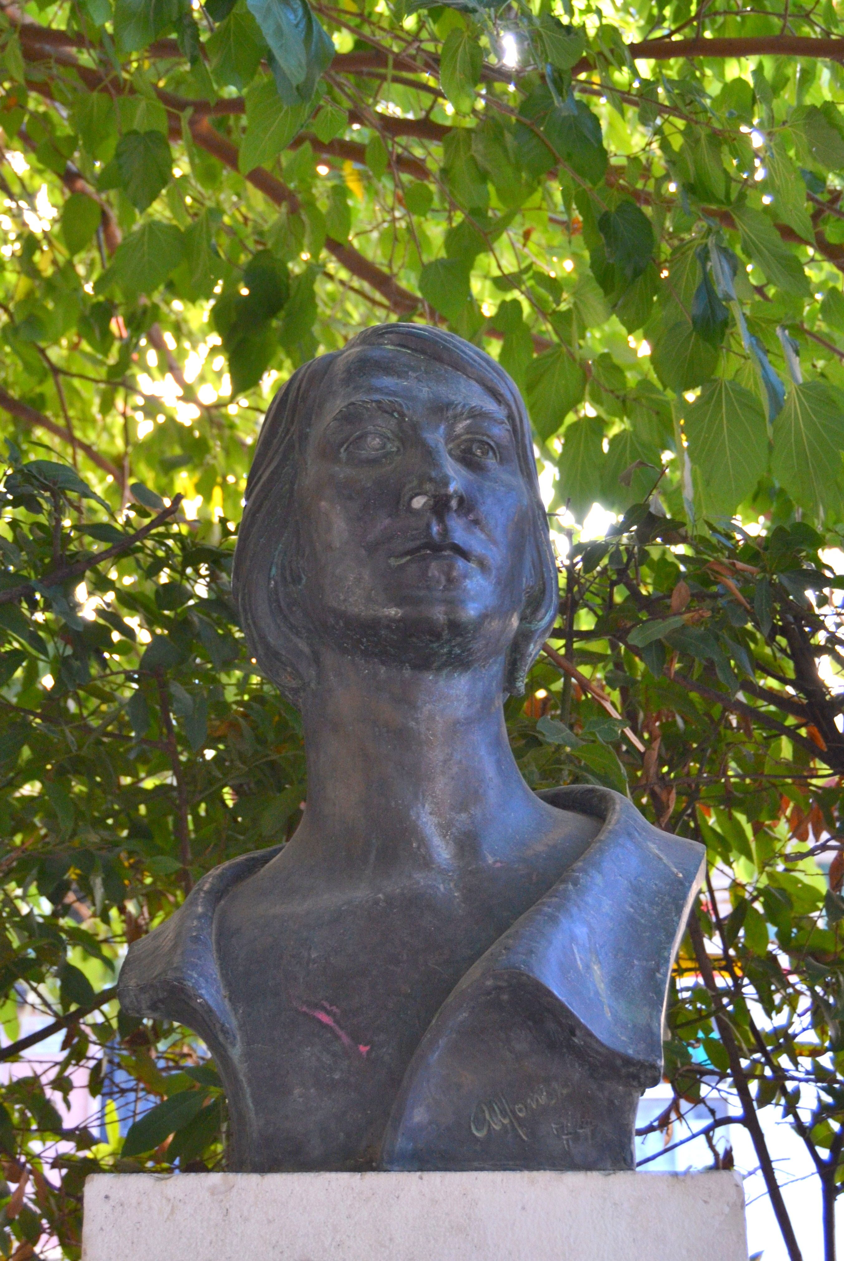 Bust del monument a Nino Bravo al carrer de Lleida de València.